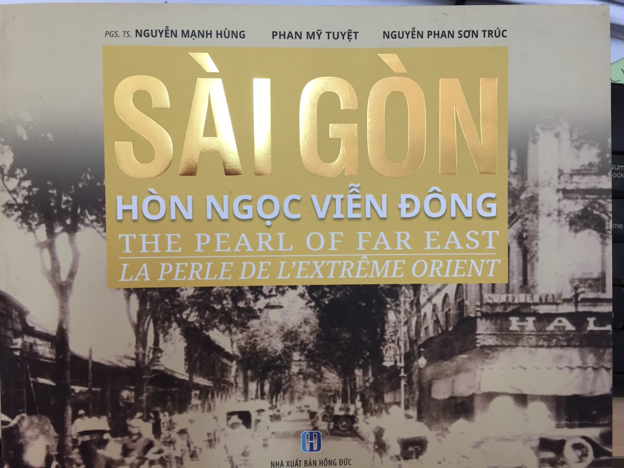 Sài Gòn - Hòn Ngọc Viễn Đông (những bước chân hóa thạch)